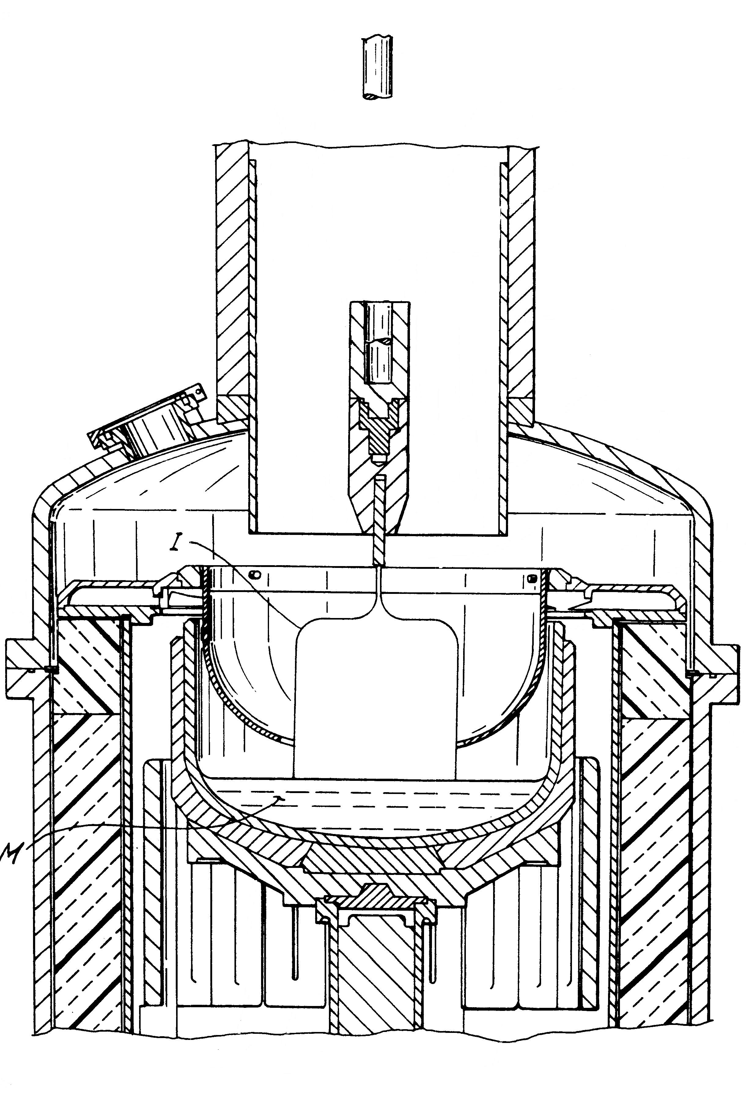 Чохральскі крістал ґроус апаратус: Конструкція типової електропечі вирощування монокристалів методом Чохральського.